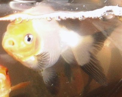 hagoromo(goldfish)